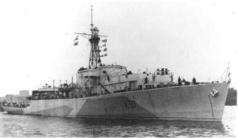 HMCS Loch Morlich